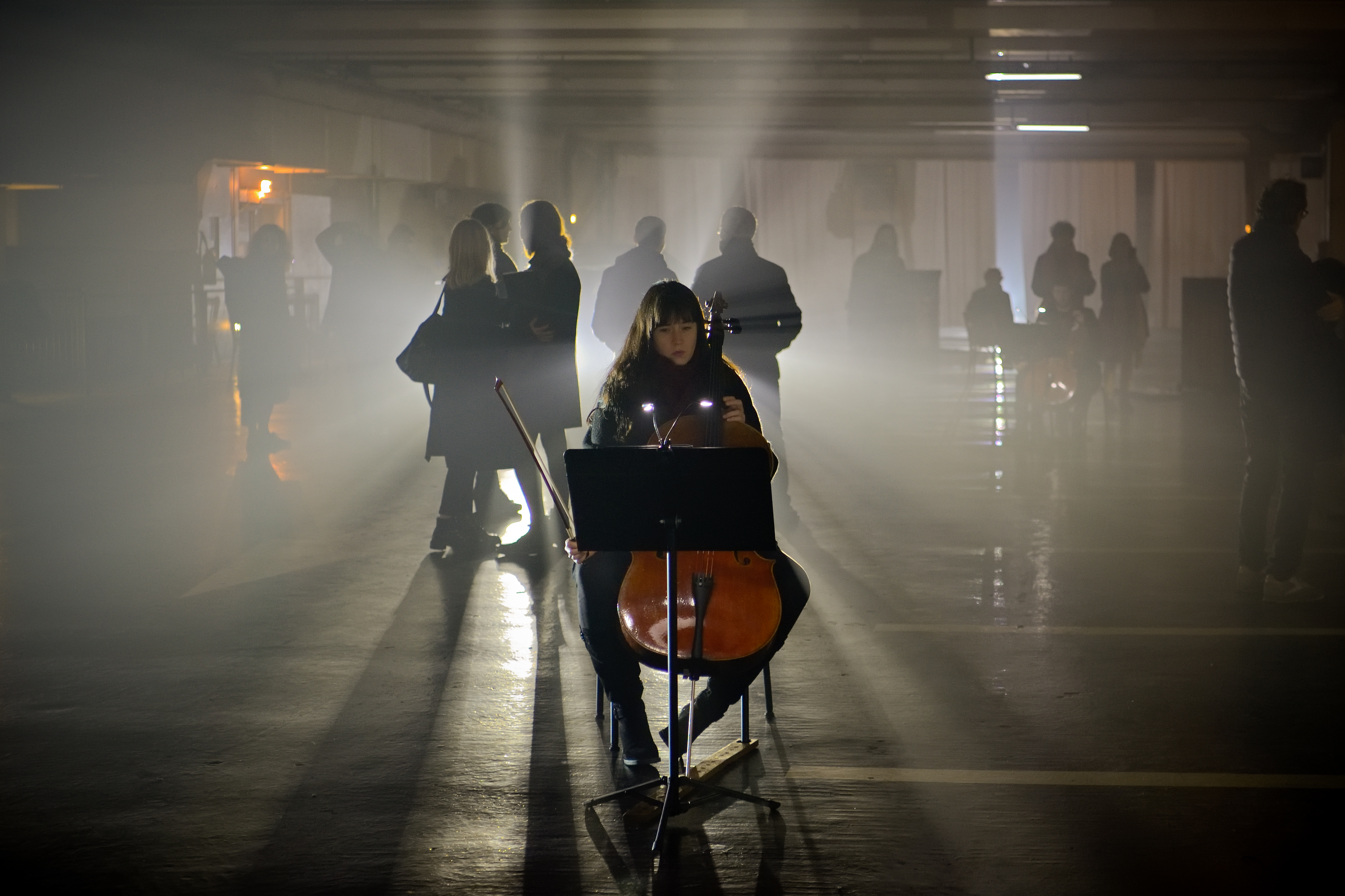 Générale de Fosse (Franck Krawczyk), 9 janvier 2020